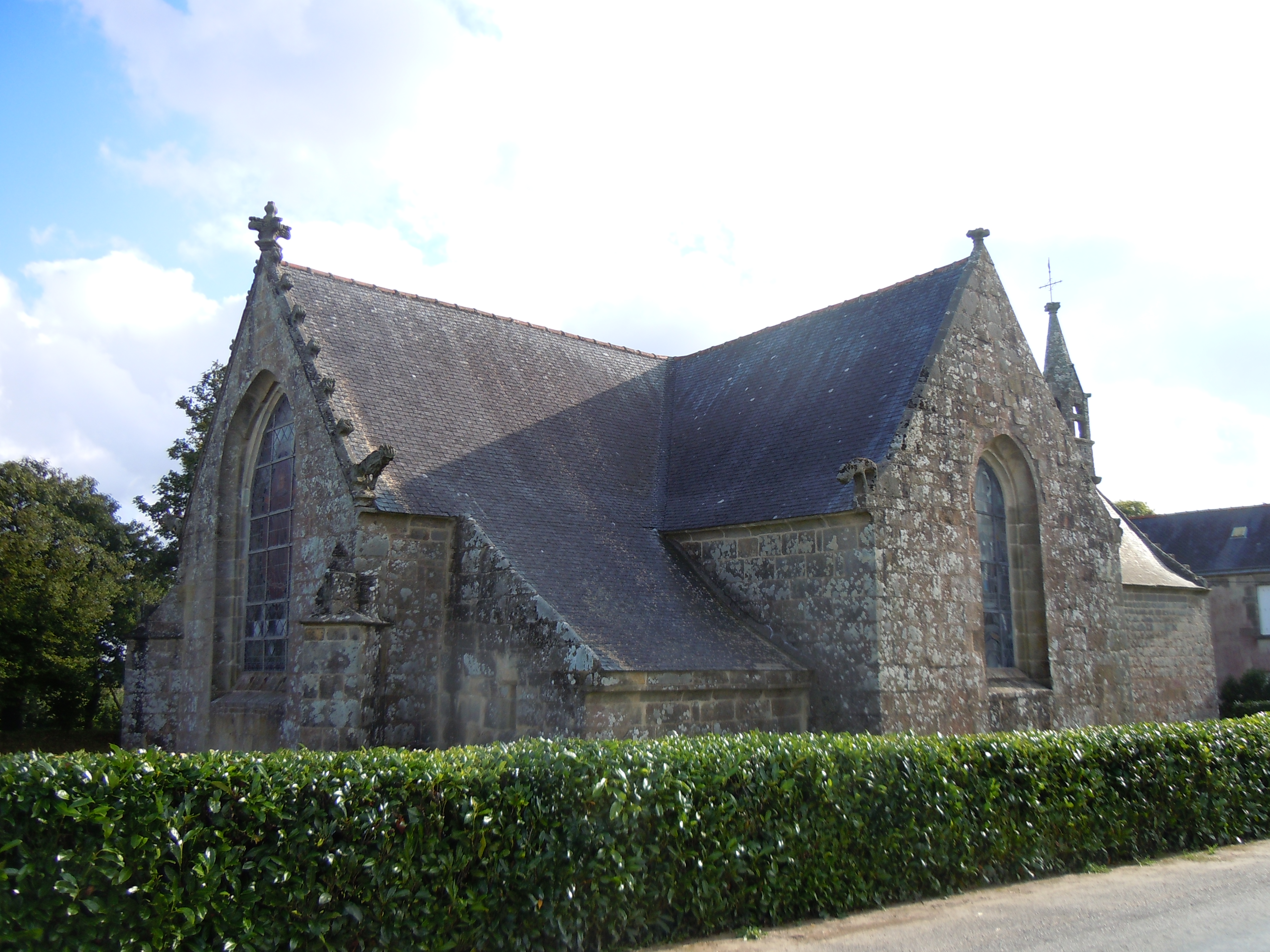 chapelle St Maudé, vue générale côté route, commune de Guiscriff, département du Morbihan, France